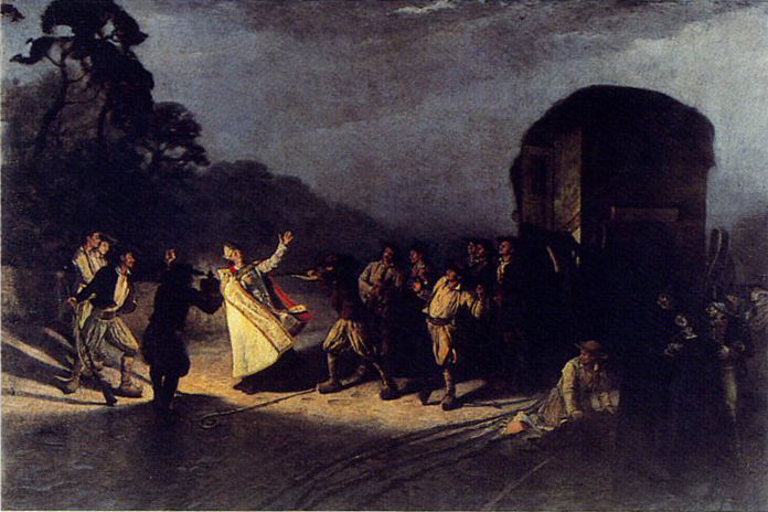 Assassinat de l'Evêque Audrein ; 28 brumaire an IX